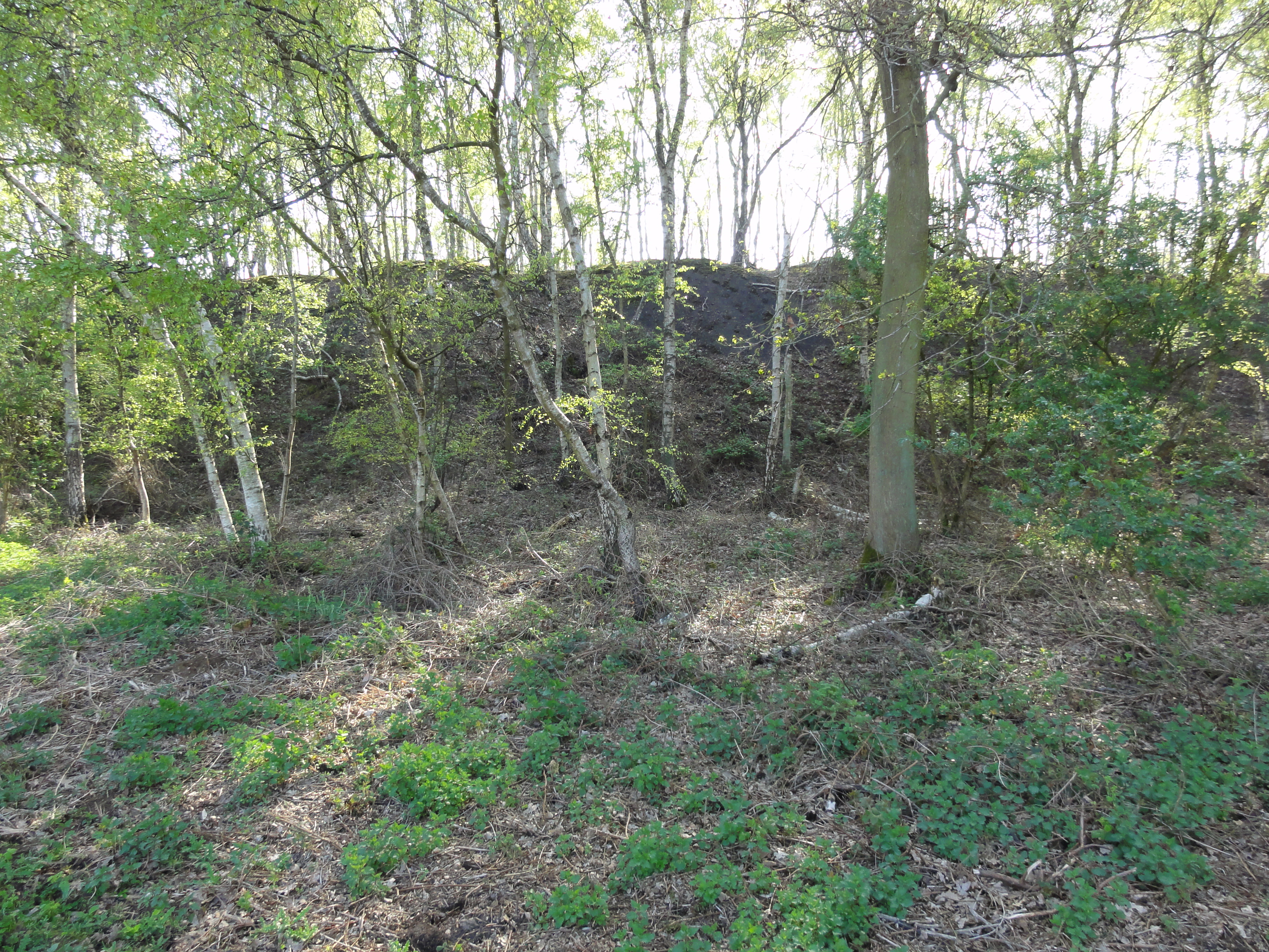 Terril n° 124 dit 1 de Flines Est, Fosse n° 1 Saint Charles de la Compagnie des mines de Flines puis de la Compagnie des mines d'Aniche, Flines-lez-Raches, Nord, Nord-Pas-de-Calais, France.